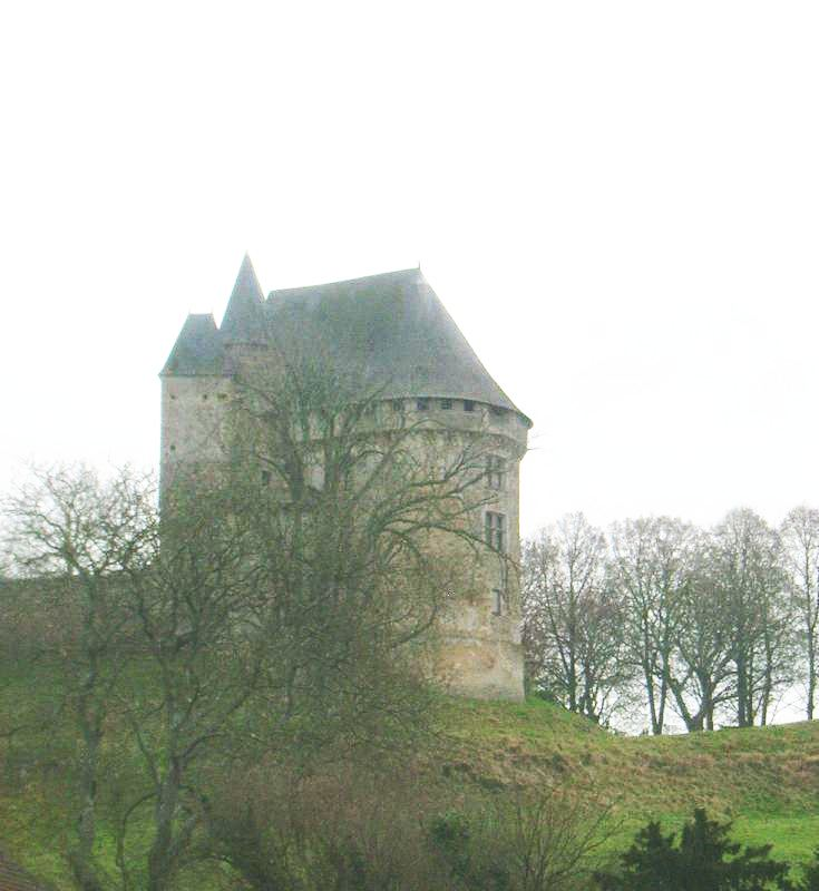 photo du donjon de Ballon-commune de la Sarthe